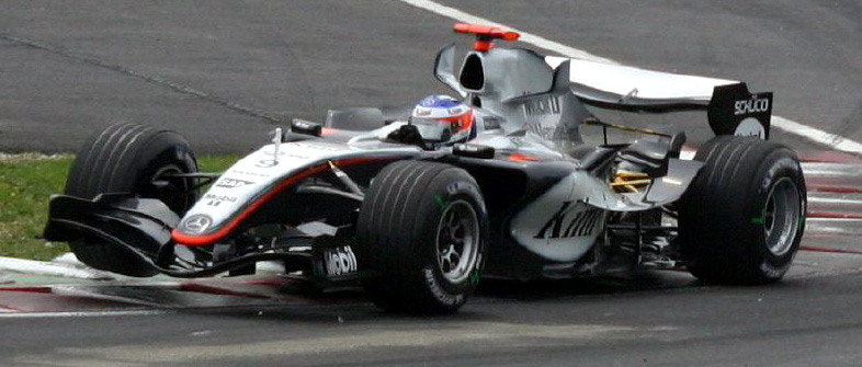 Kimi Räikkönen (McLaren) at Canadian GP 2005